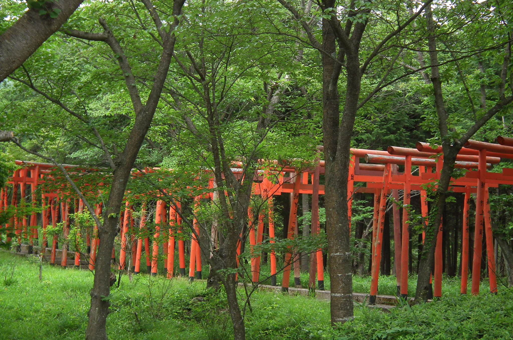 Oka-Inari 岡稲荷神社 鳥居